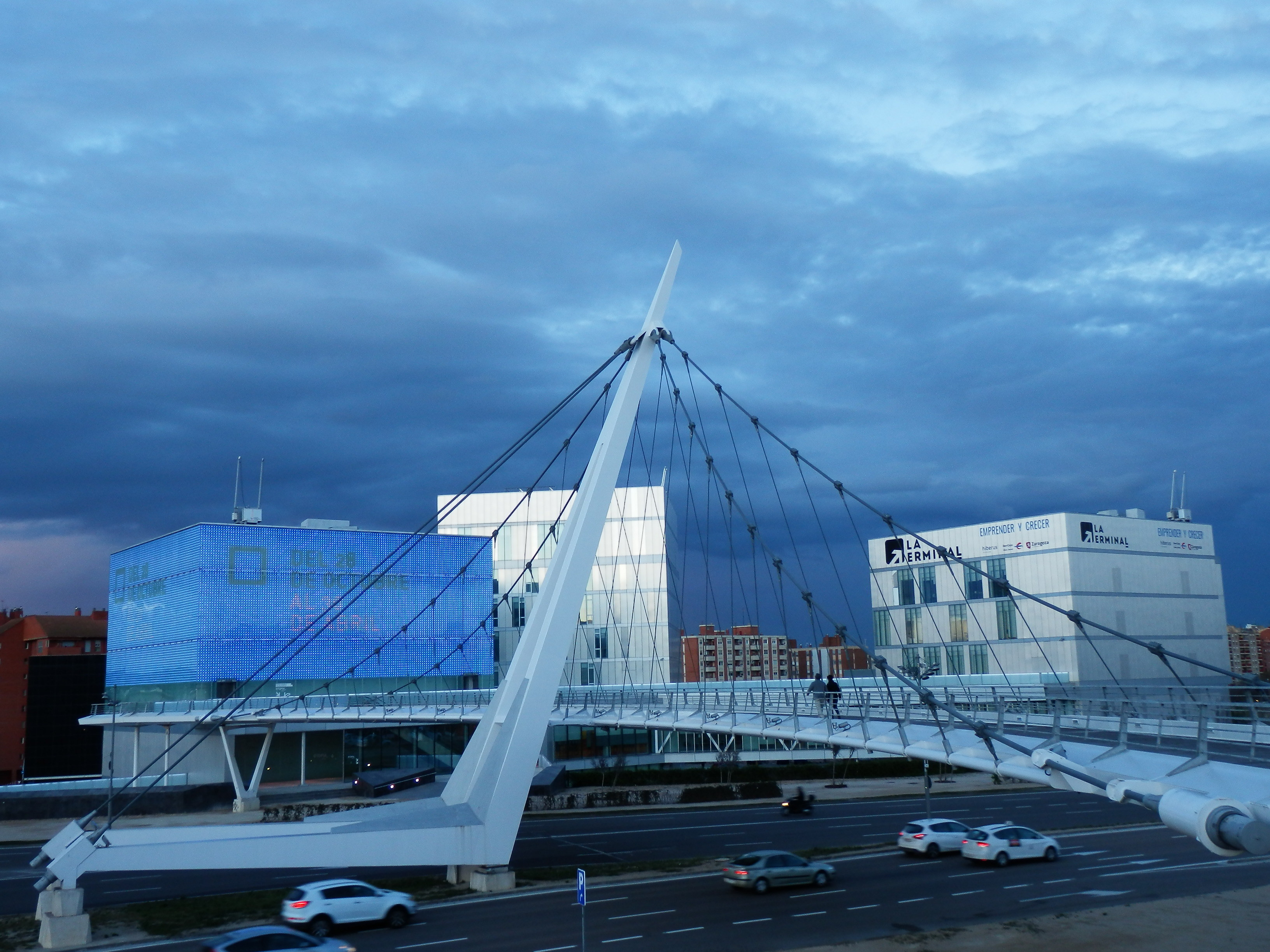 Pasarela con la Milla Digital de Zaragoza.